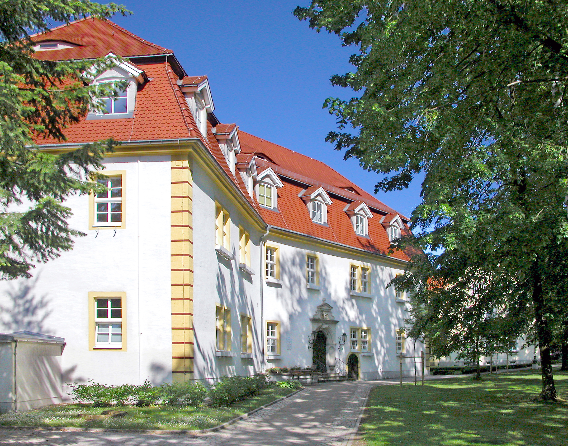 18.05.2007 01896 Pulsnitz, Wittgensteiner Str. 1: Altes Schloß (Eustachius Haus). Erbaut im 16. Jh. unter Eustachius II. von Schlieben. Sicht von Süden. [DSCN8037.TIF]20070518265DR.JPG(c)Blobelt